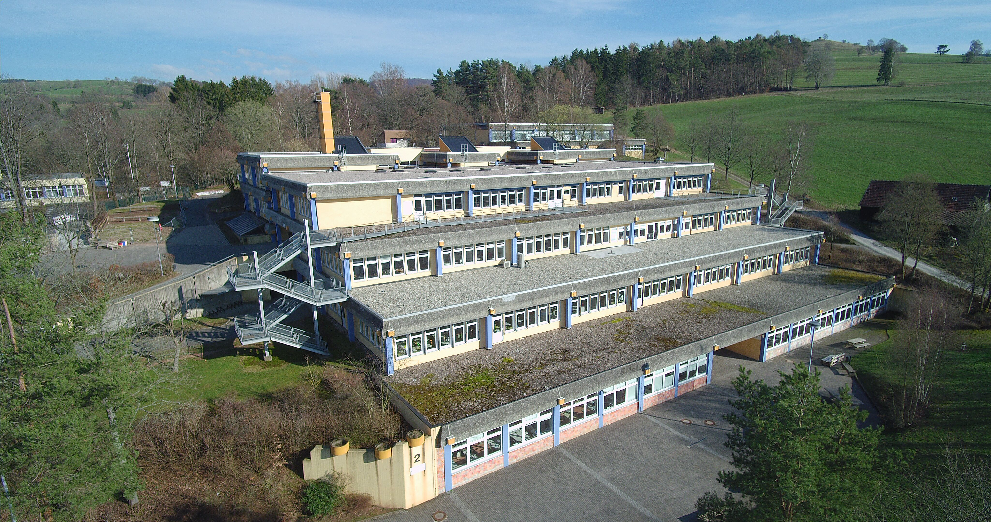 Rhönschule Gersfeld